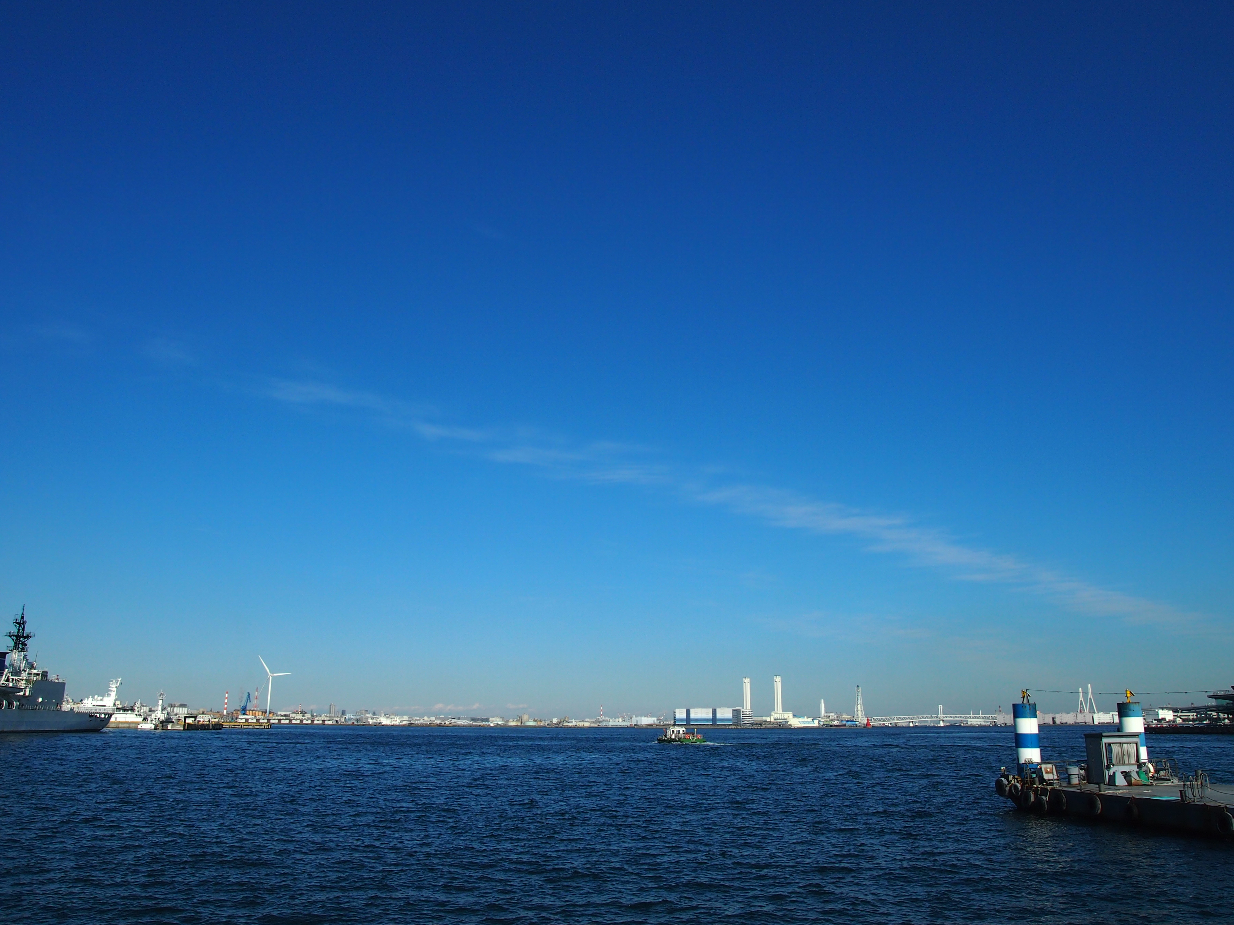 横浜赤レンガから撮影した横浜港。